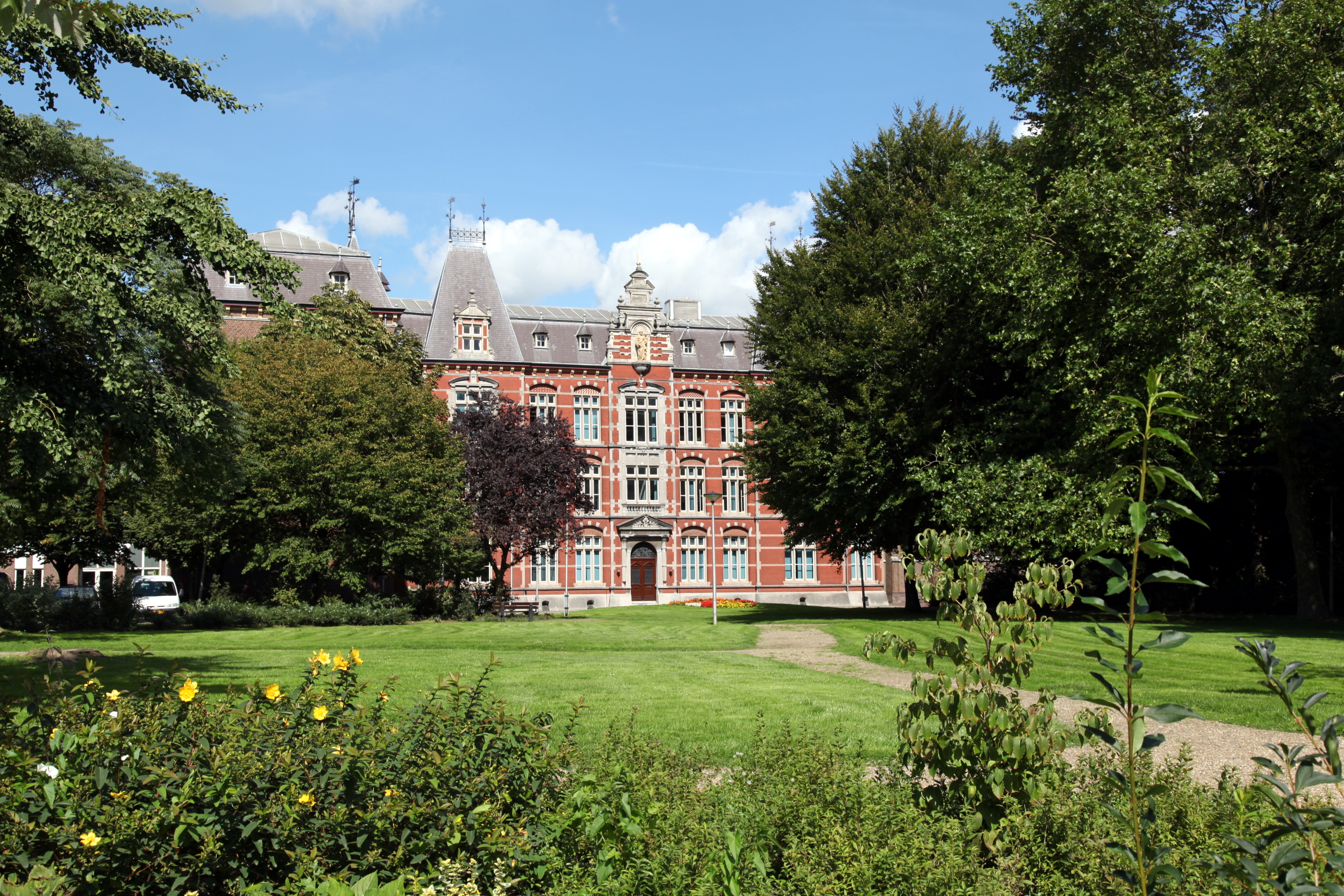 Gemeentehuis in Eijsden (Nederlands Limburg)